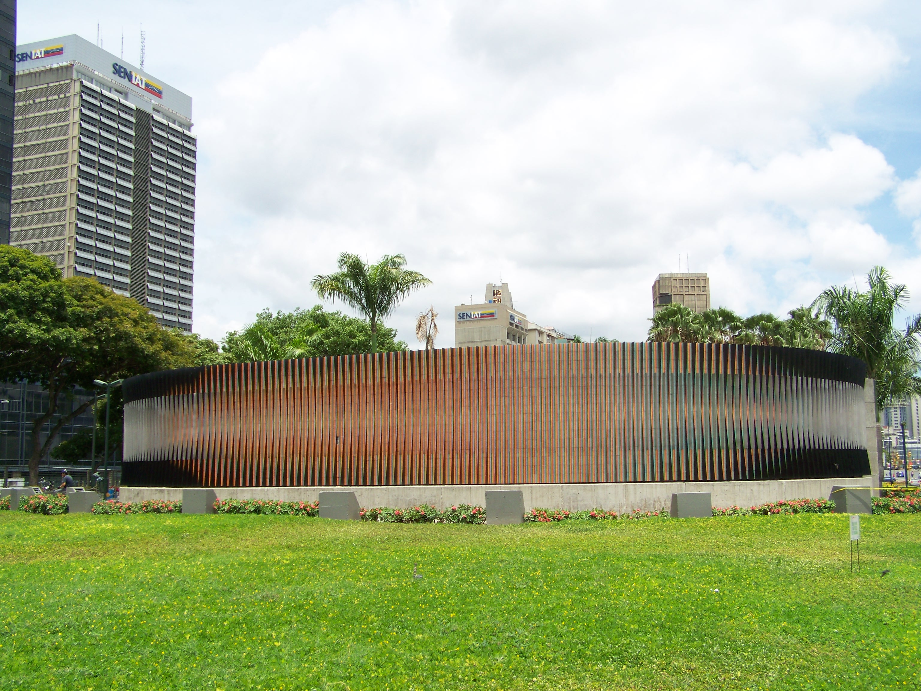 Doble Fisicromia de Carlos Cruz Diez